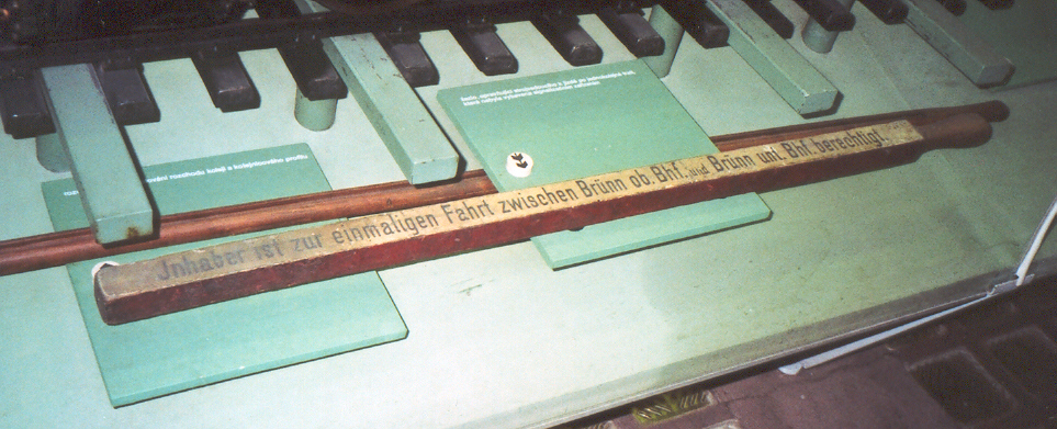 Žezlo opravňující k použití traťového úseku. NTM 2006